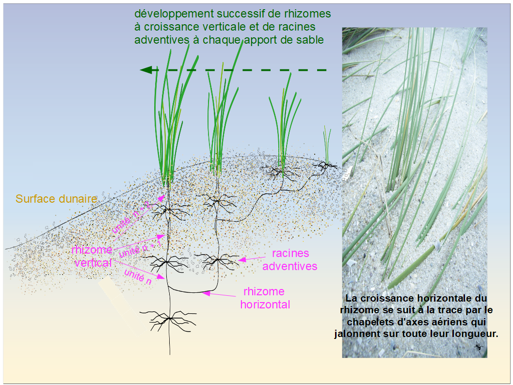 Comportement de l'Oyat (Ammophila arenaria) dans les dunes à voie d'exhaussement rapide.